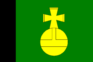 vlajka obce Petrůvka